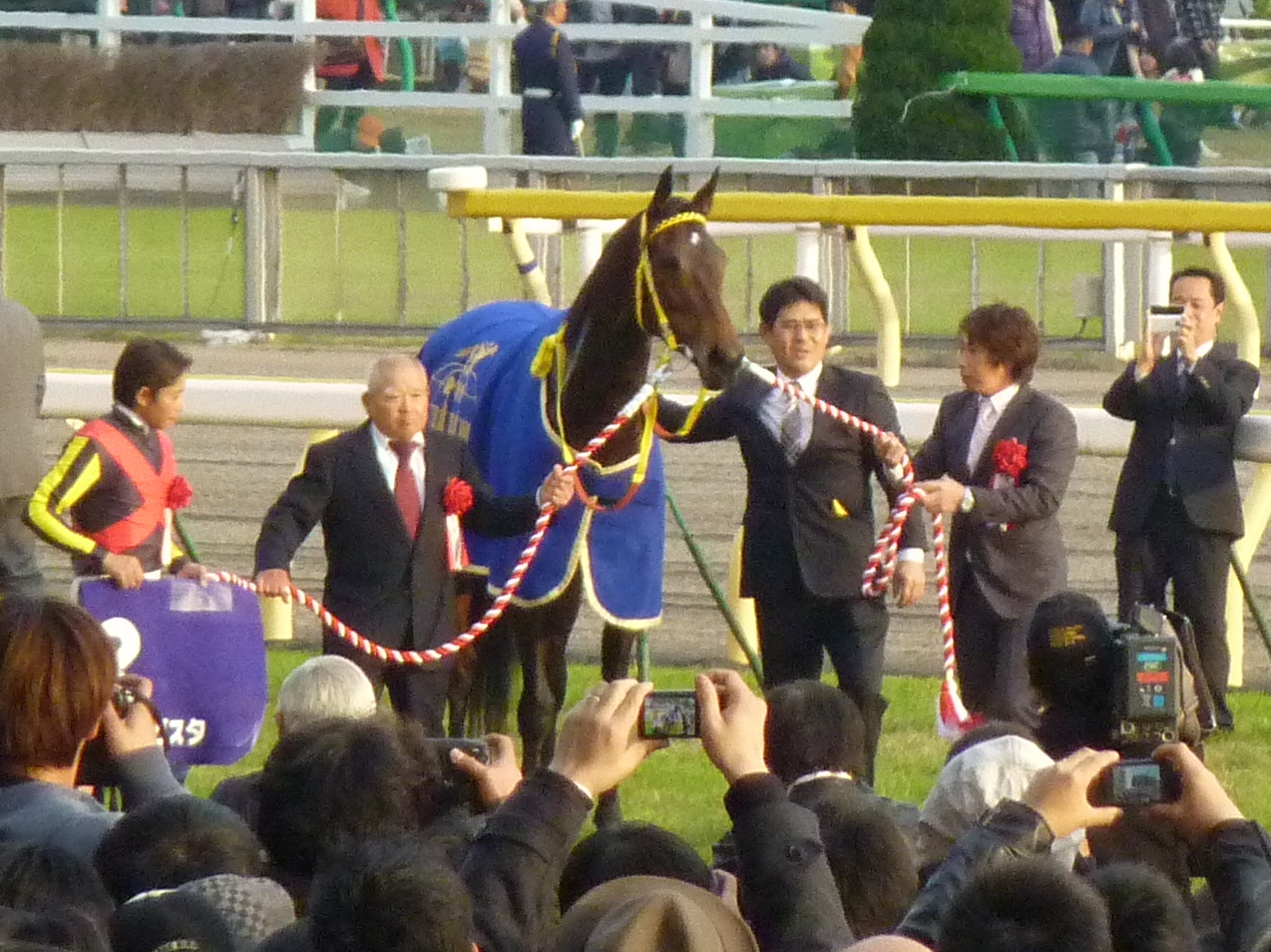 2011年11月27日 第31回ジャパンカップ 優勝馬ブエナビスタ 口取り式の模様です。